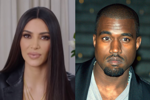 La coppia Kim Kardashian e Kanye West